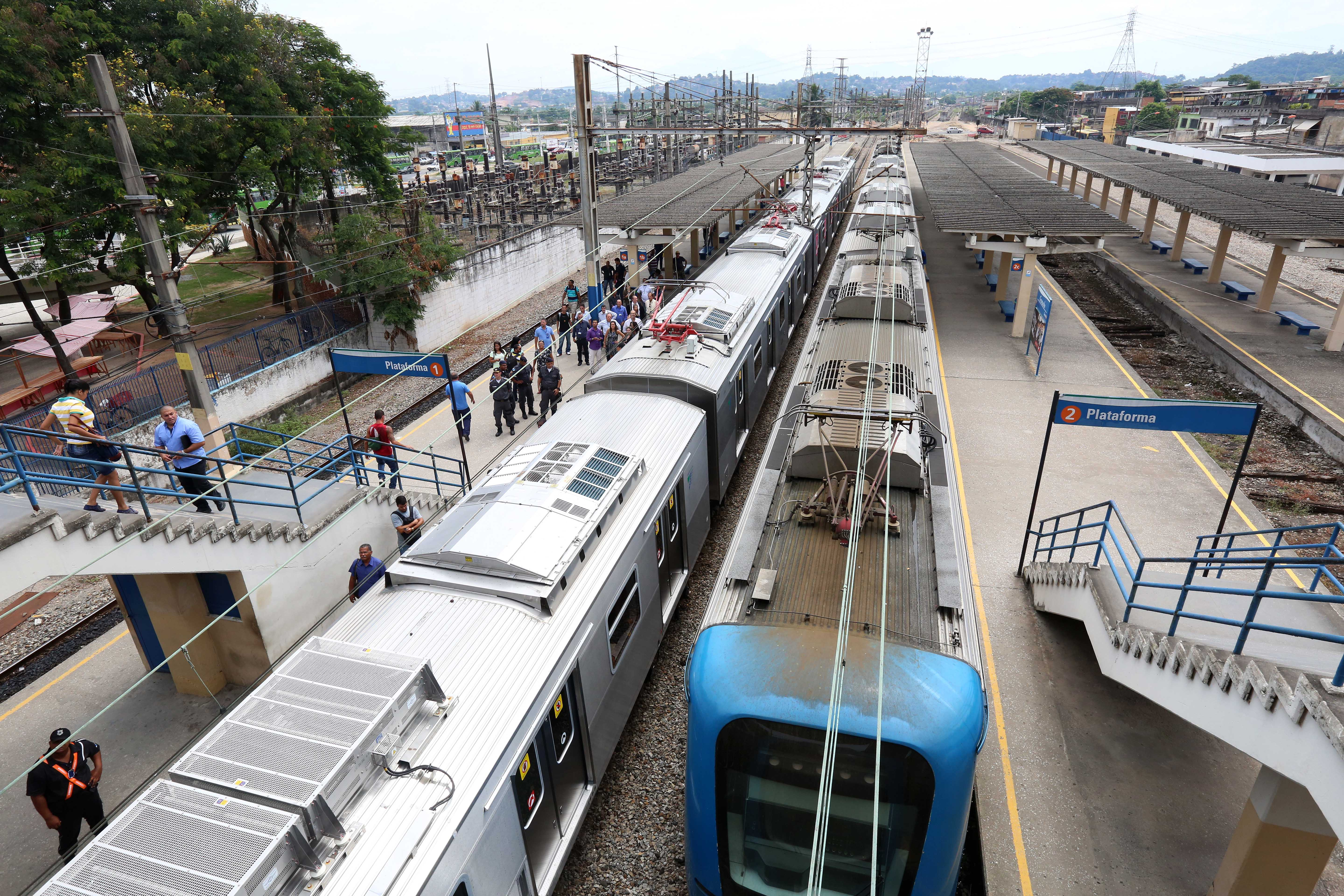 Trem Série 4000 e Trem Série 3000 de passagens na estação Gramacho